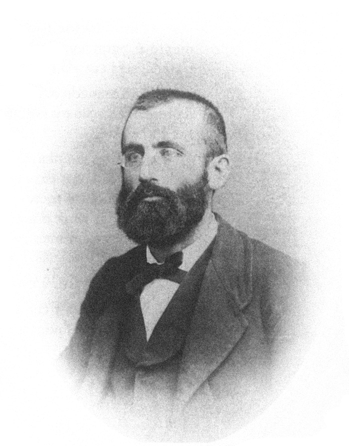 Fotografia de Bezerra de Menezes provavelmente aos 50 anos (1881) - recuperada e cedida por Renata Blanda Furtado